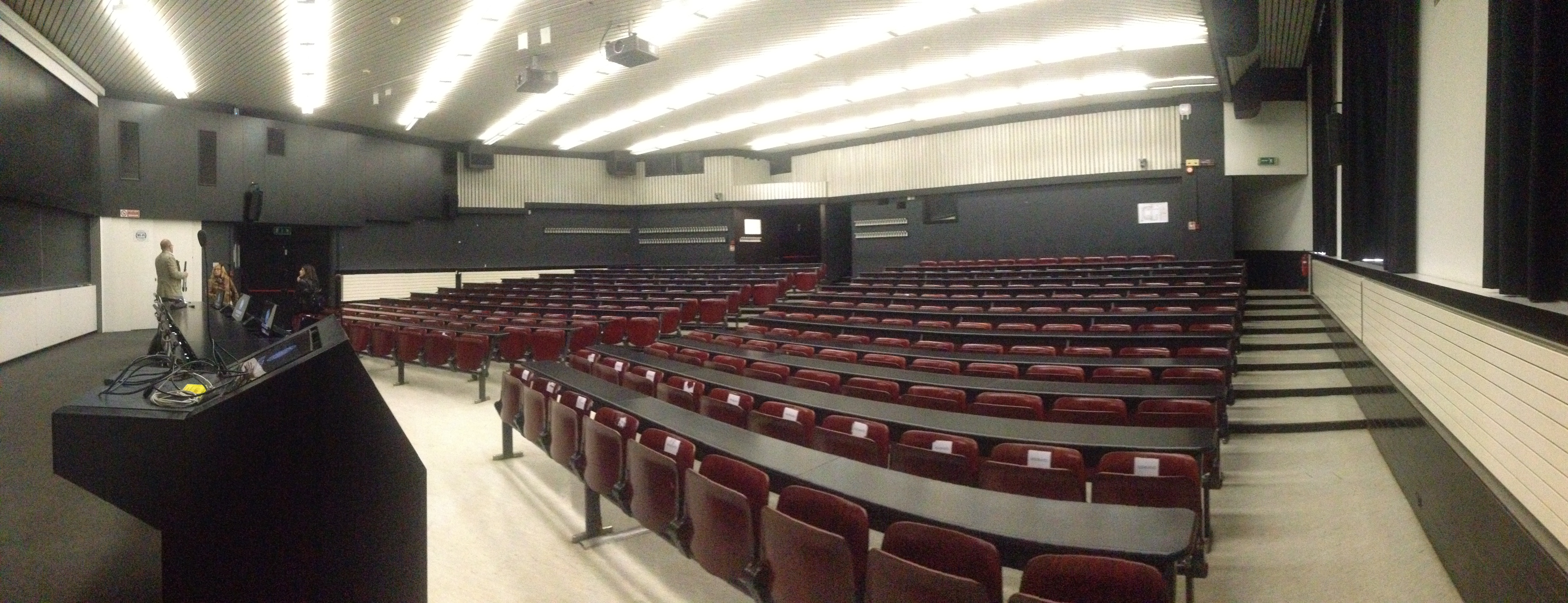 Politecnico di Milano, Edificio 3 Gino Cassinis - Sala De Donato